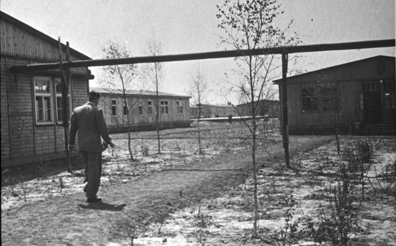 27 Barackenlager